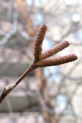 River Birch.